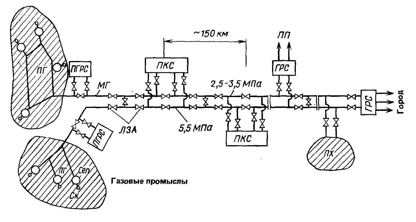 Принципиальная схема газотранспортной системы